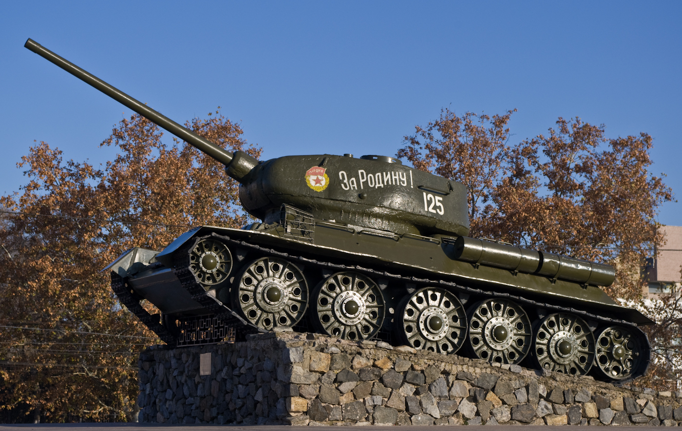 Танк-памятник Т-34 на Мемориале Славы в Тирасполе